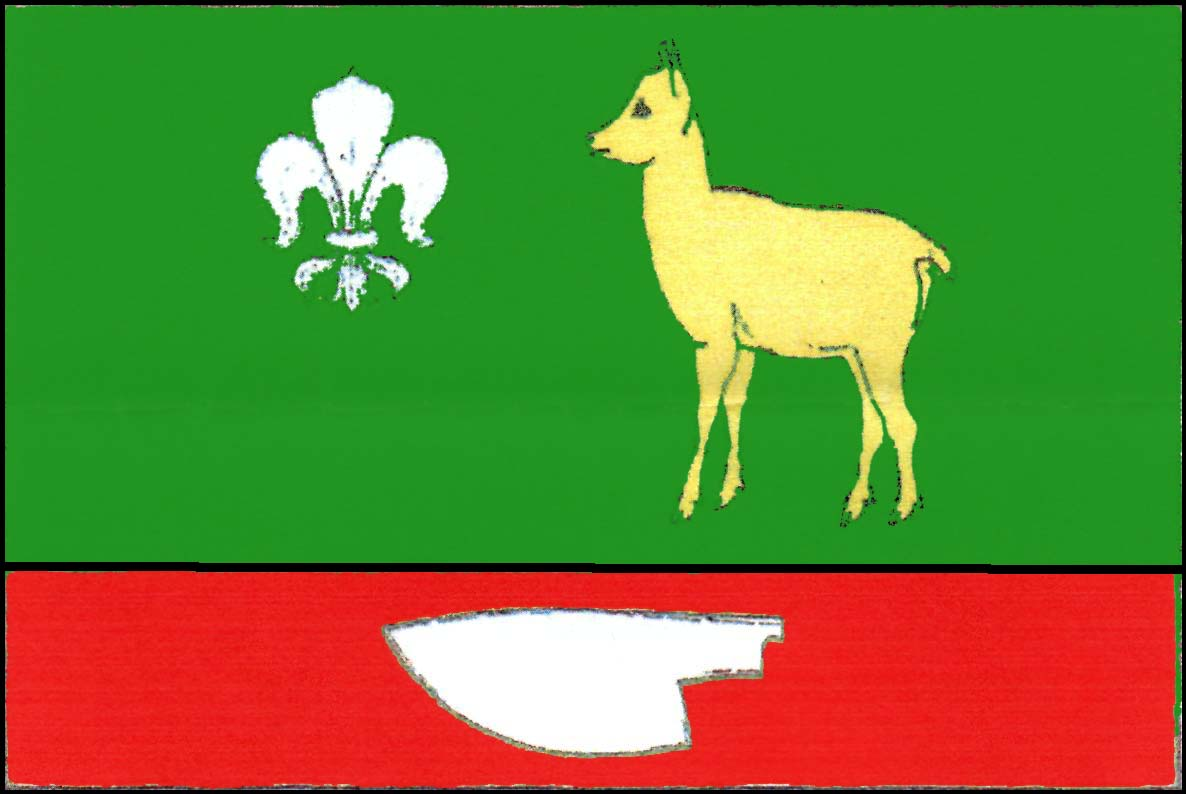 Vlajka obce Řikonín